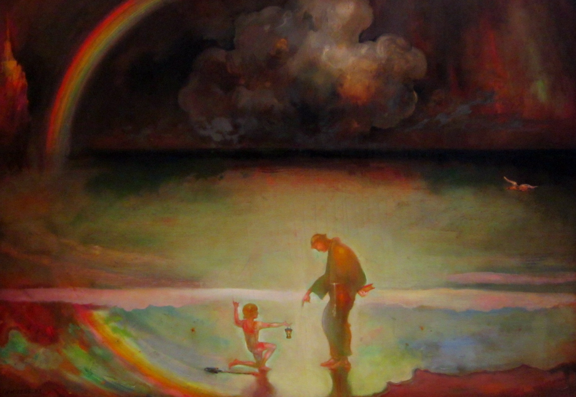 Gustaw Gwozdecki - Sen Św. Augustyna